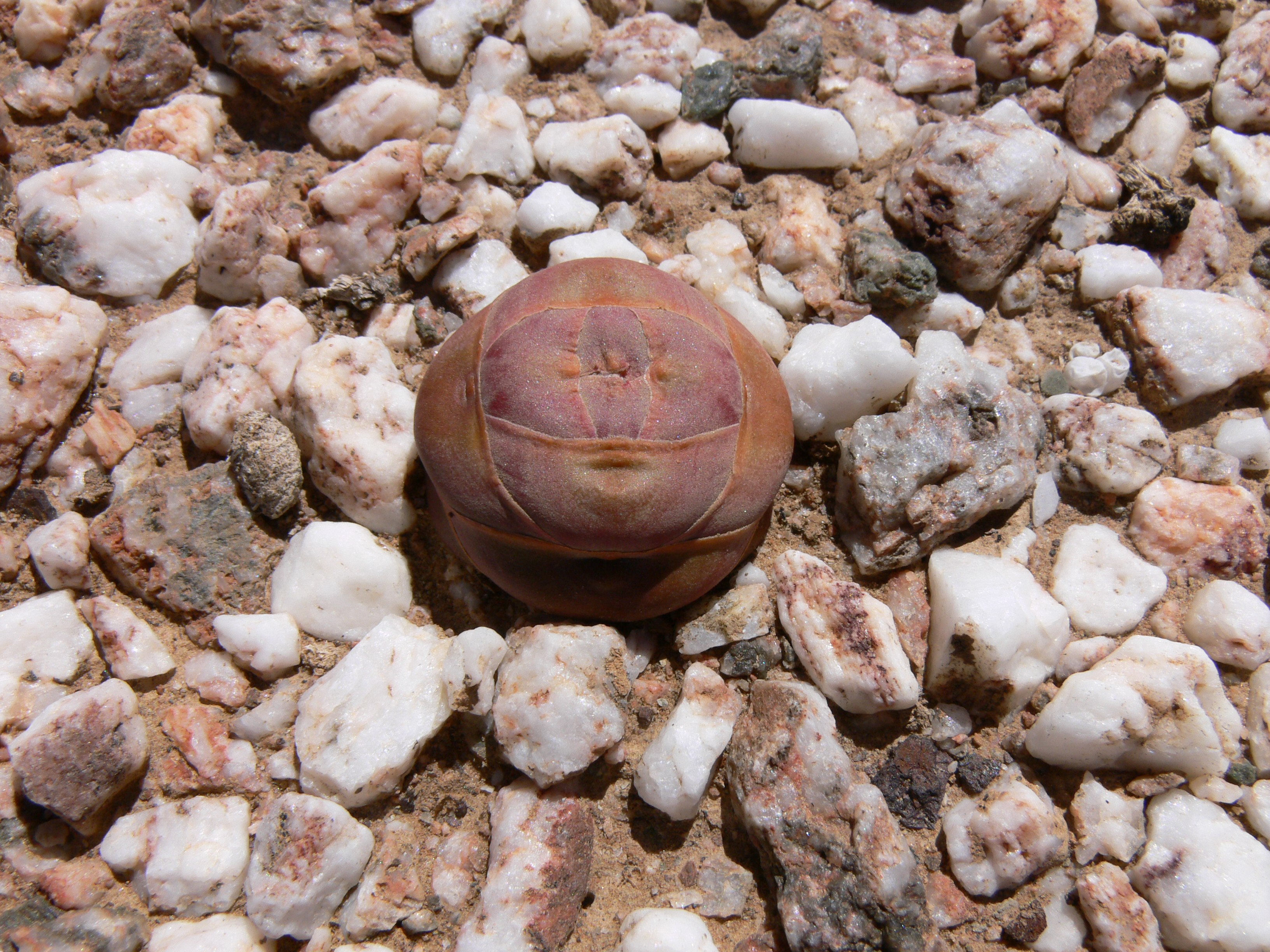 Crassula columnaris, Kleine Karoo, Südafrika, nahe Barrydale